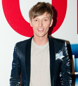 Павел Воля 20 марта 2011 года на премьере фильма «Служебный роман: Наше время»